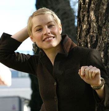 Soraya Arnelas